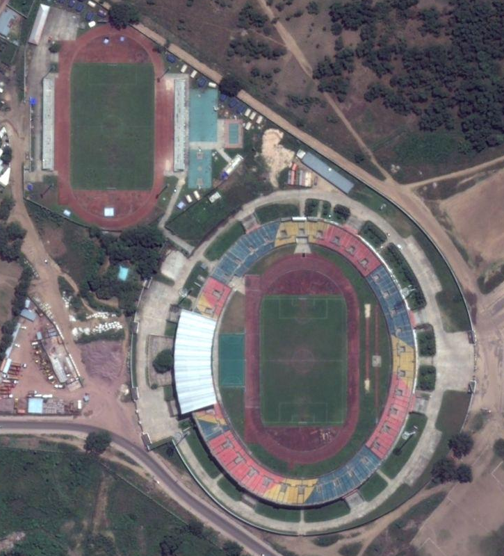 Ancien stade de la Révolution